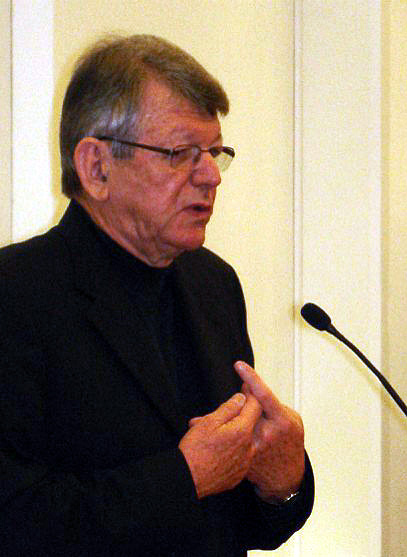 Dom Erwin Kräutler bei einem Vortrag im Bildungshaus Schloss Puchberg bei Wels